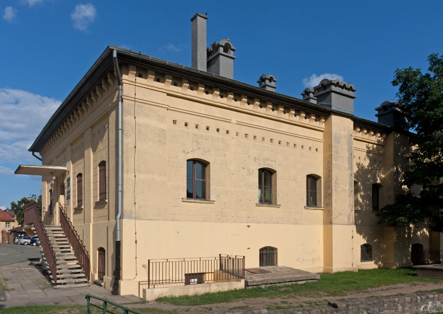 Toruń, ul. Dominikańska 3 - Twierdza Toruń: piekarnia wojskowa, l. 1820-25 (zabytek nr A/343)